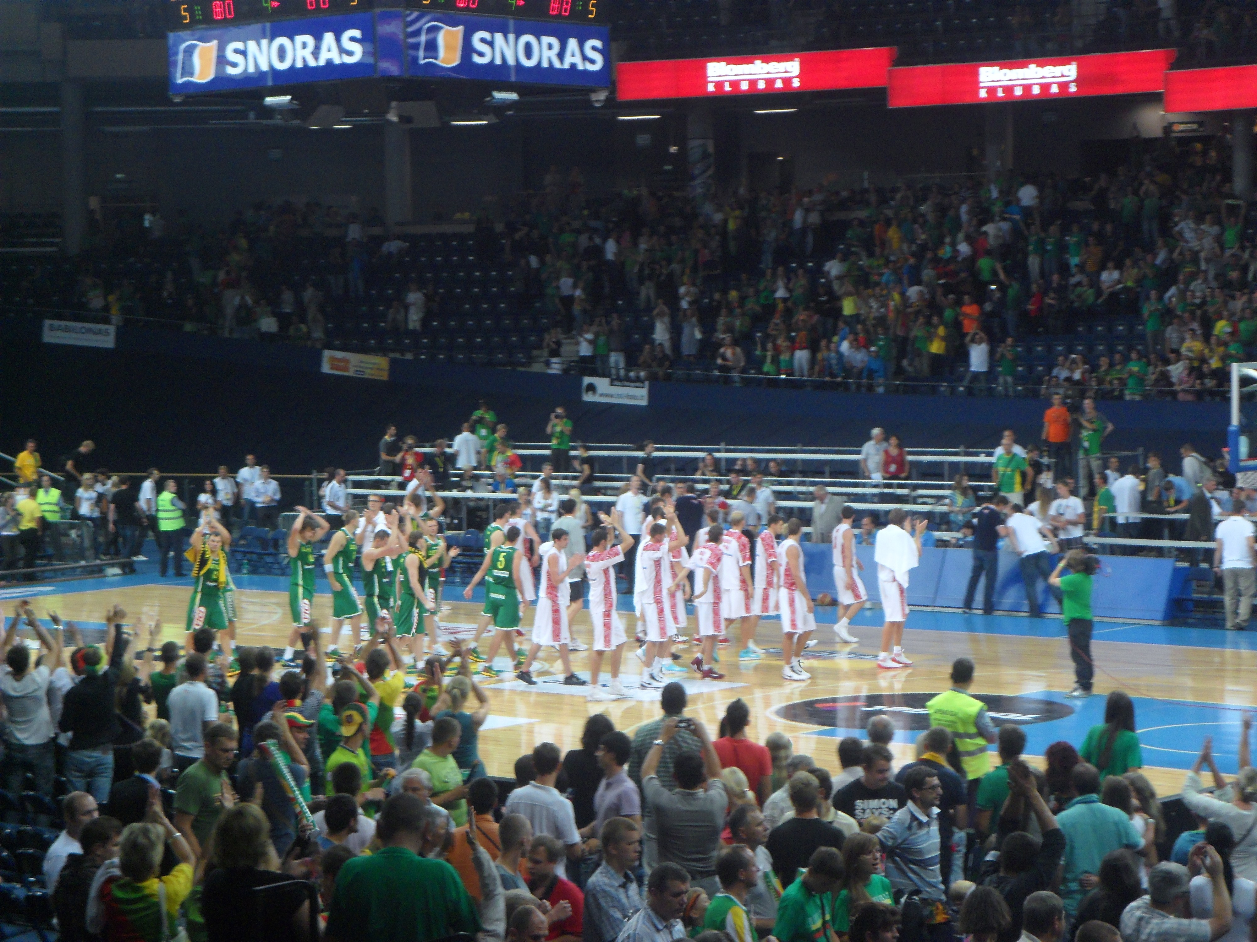 Panevėžio "Cido" arena, po varžybų Lietuva-Rusija